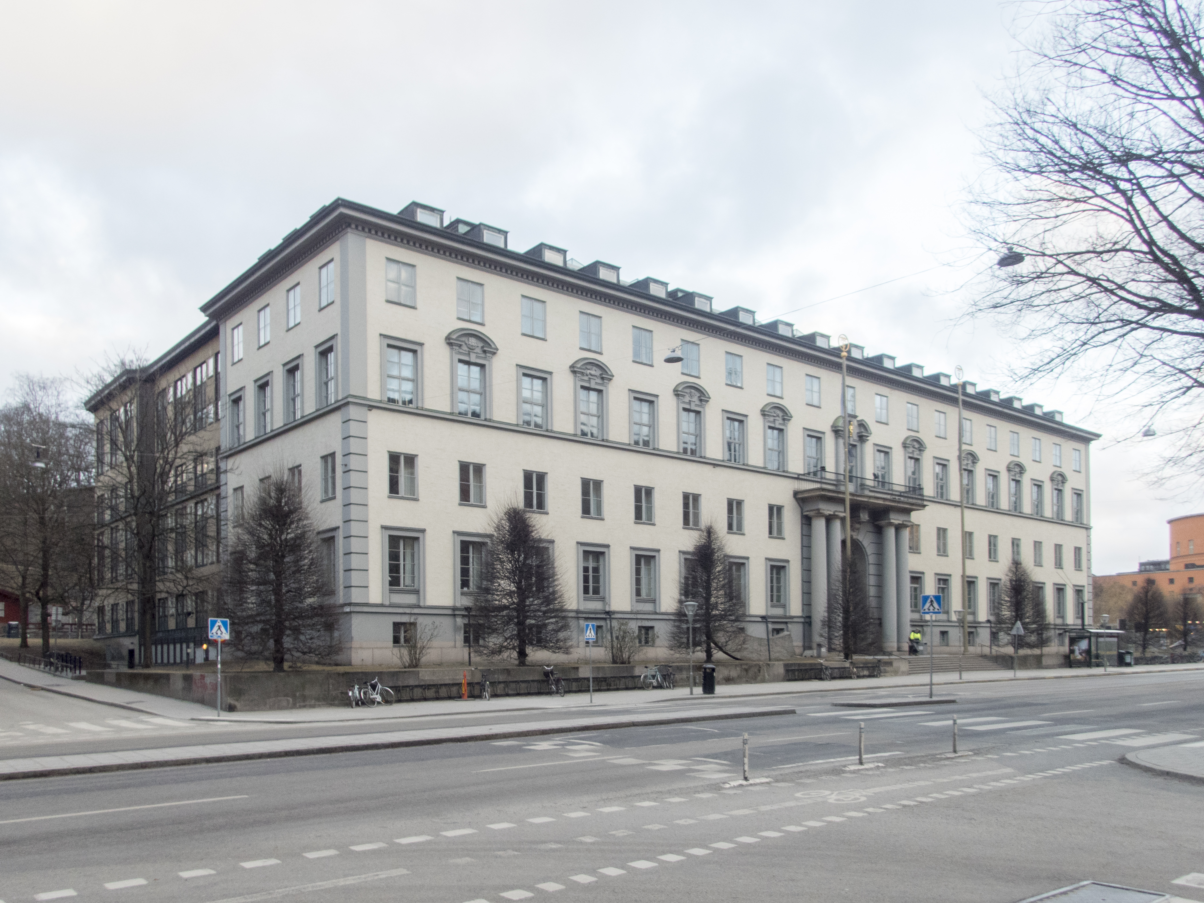 Handelshögskolan. Sveavägen 65, Kungstensgatan 32. Byggnadsår 1925-26, arkitekt Ivar Tengbom, byggherre Handelshögskoleföreningen, byggmästare Hesselman & Bergström. Tillbyggnad 1975 arkitekt Åke Ahlström